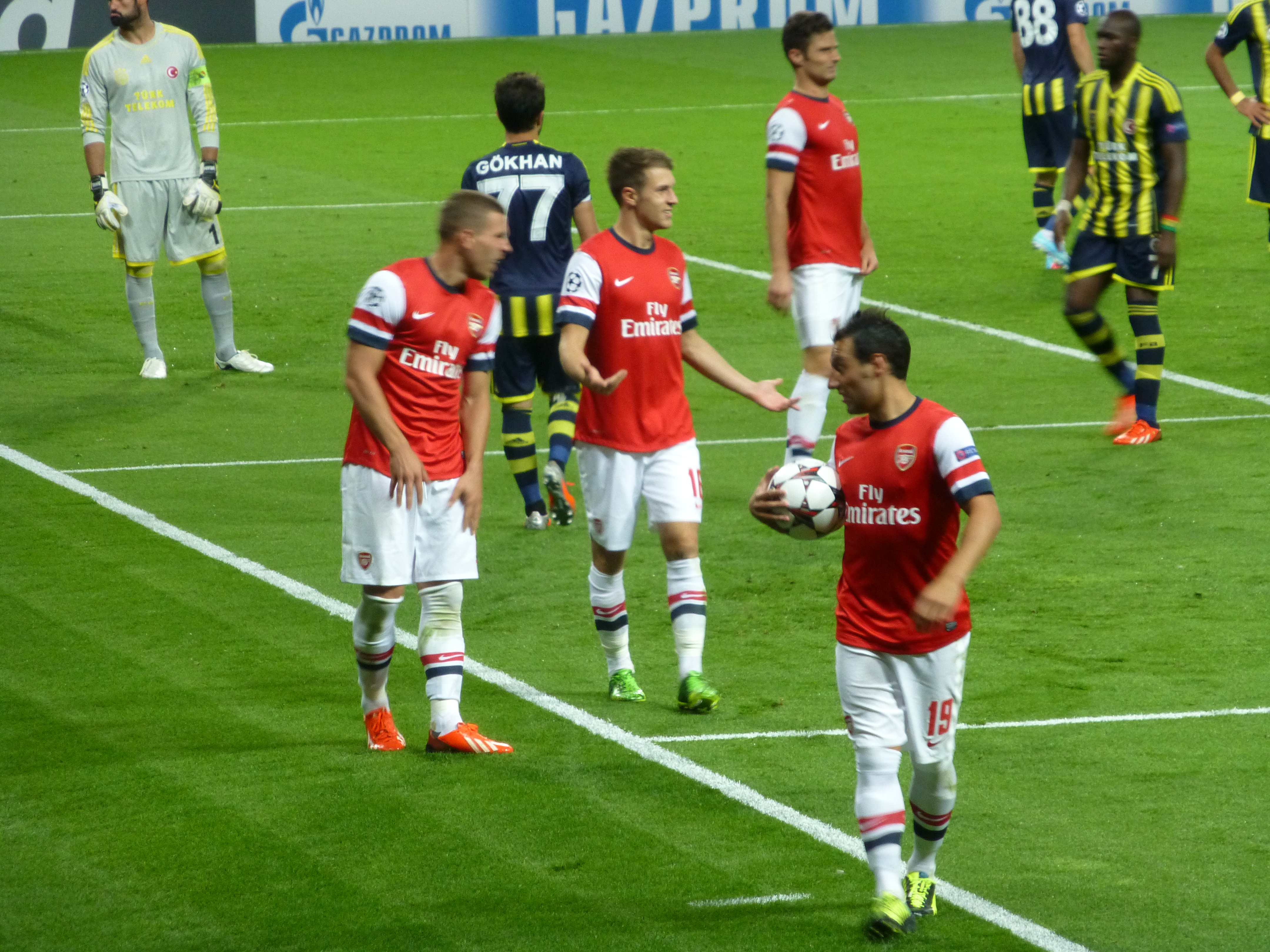 Arsenal vs Fenerbahce